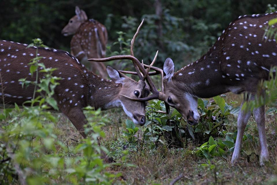 മാനുകൾ കൊമ്പുകോർക്കുന്ന ദൃശ്യം പകർത്തിയത് മൈസൂരിനടുത്ത്